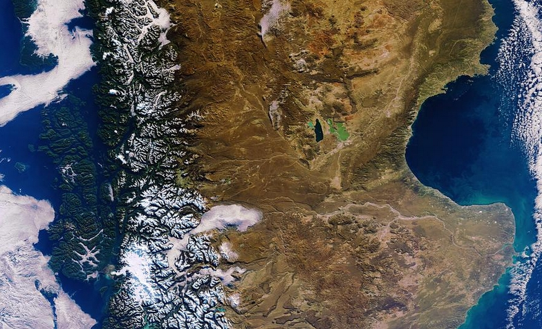 Vista a la cuenca del golfo san jorge Snow runs down the spine of the Andes Mountains along the southern tip of South America. Chile is on the left, and Argentina is on the right. The water cutting across the continent in the bottom center of the image is the Strait of Magellan, once the only safe route between the Atlantic and the Pacific Oceans. Along the coast of Argentina, waters of the Atlantic Ocean are tinted green with sediment.